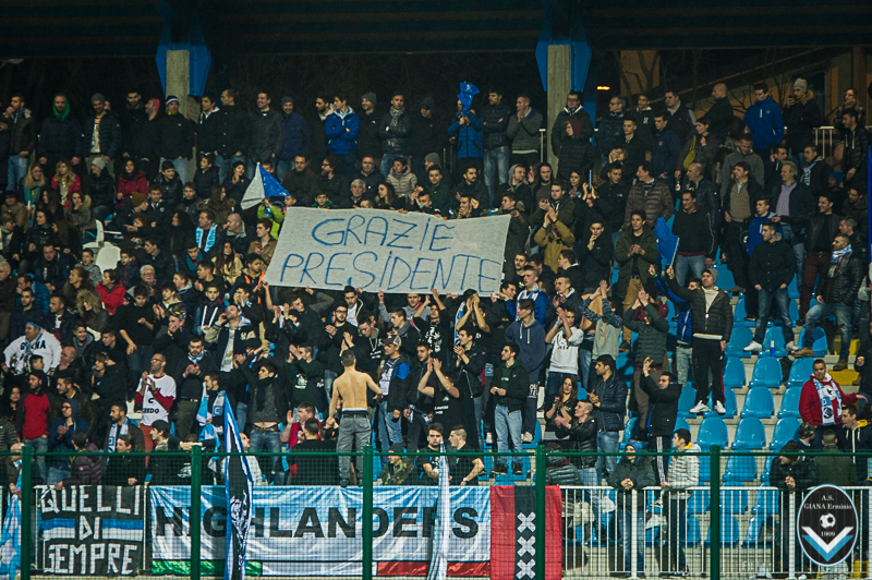 Pubblico e ultras sulla tribuna sud dello Stadio comunale Città di Gorgonzola durante la partita di calcio Giana Erminio-Unione Venezia, valida per il campionato di Lega Pro 2014-2015